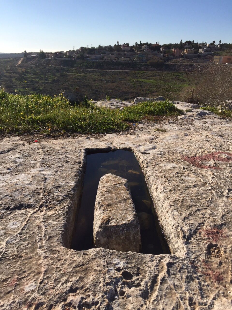 קבר ארגז באתר גתות ברקן